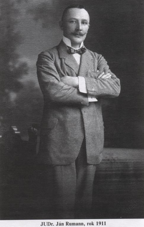 Ján Rumann (1876 - 1925), Slovenský a československý publicista, advokát a politik.